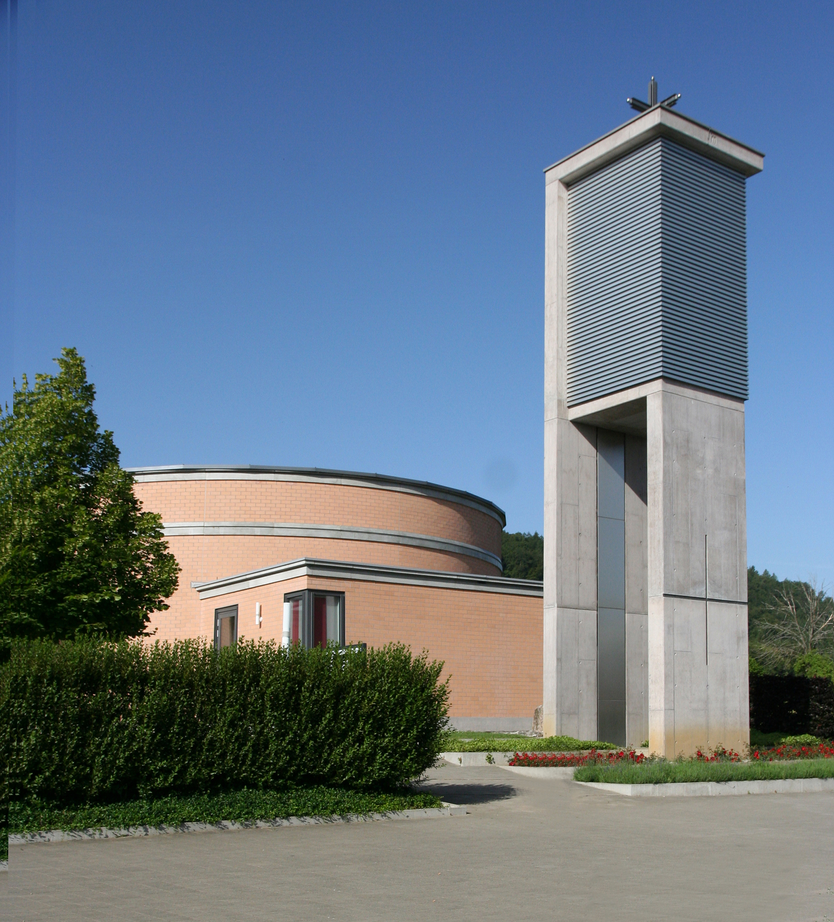 Römisch-katholische Kirche St. Leonhard Feuerthalen, Kirchturm